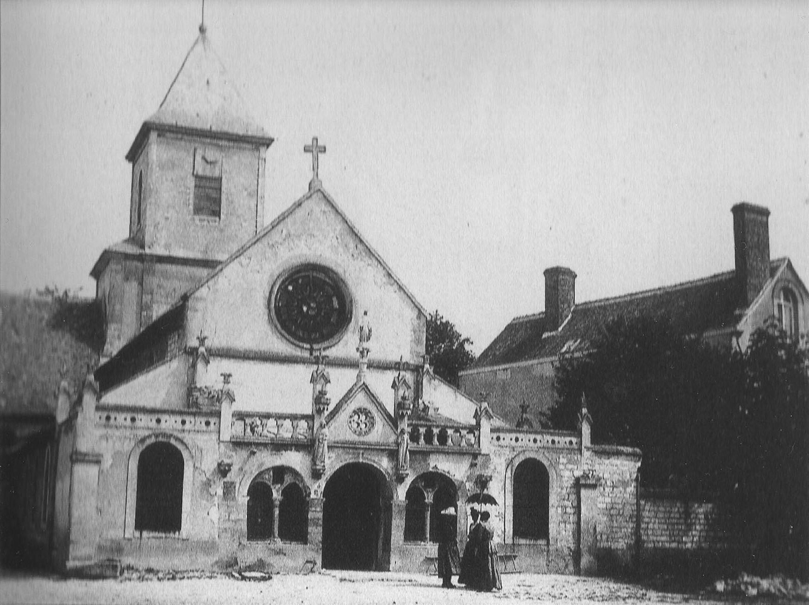 Église_avec sa façade_romane_intégrée en_galerie.